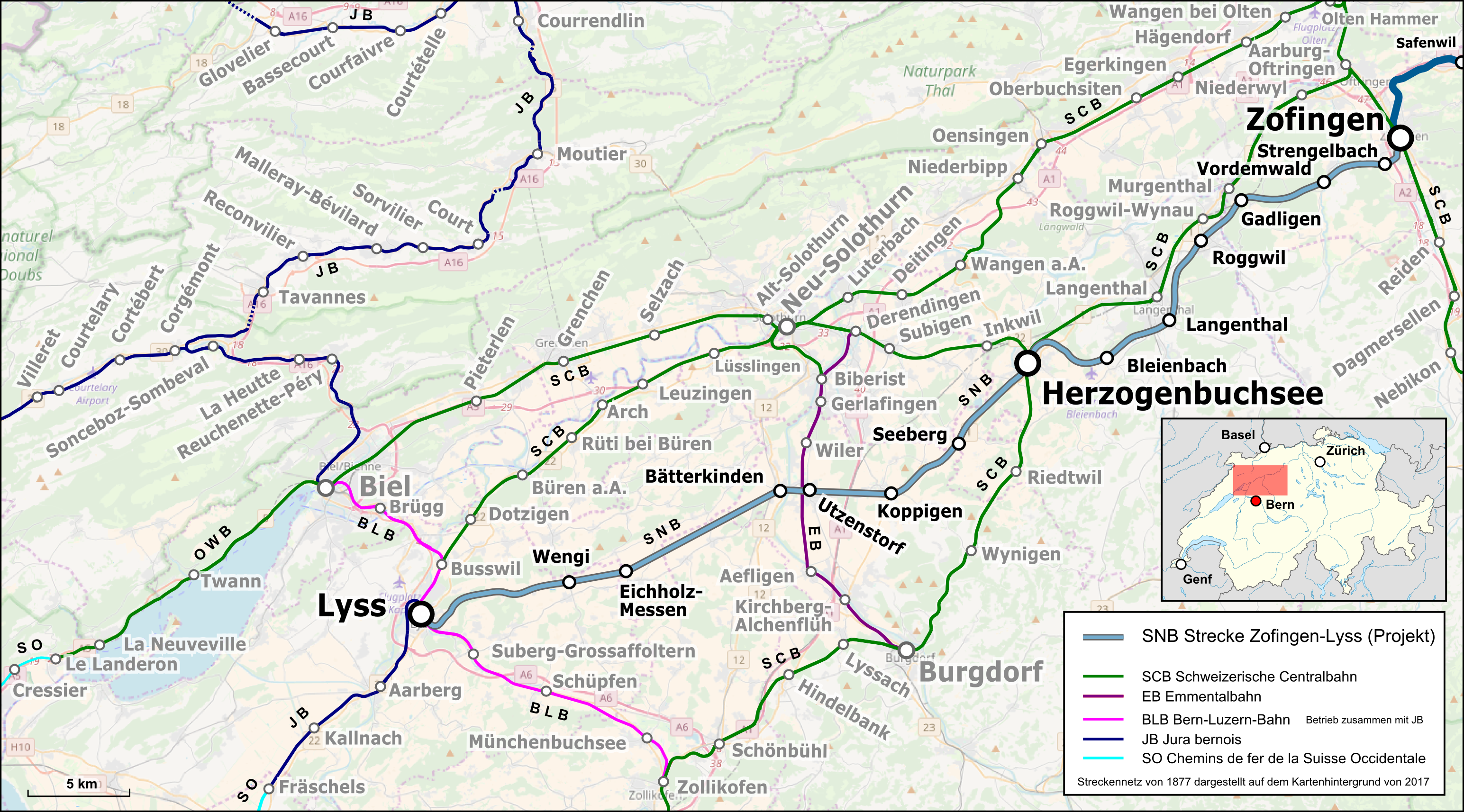 Karte der geplanten Strecke Zofingen—Lyss der Schweizerischen Nationalbahn dargestellt im Eisenbahnnetz von 1877.